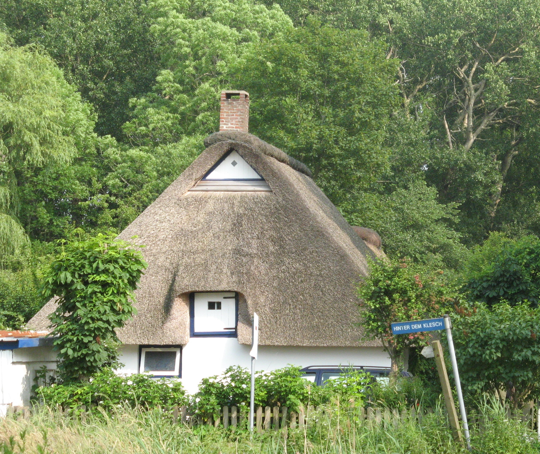 house in süderdeich